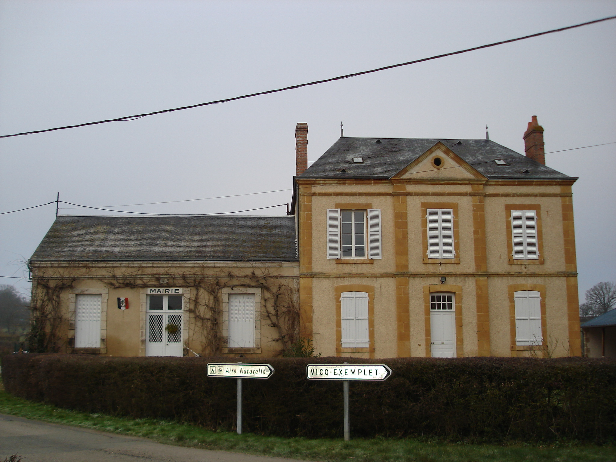 Néret (36) : La mairie.